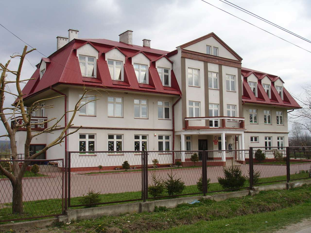 village Pawłokoma - school